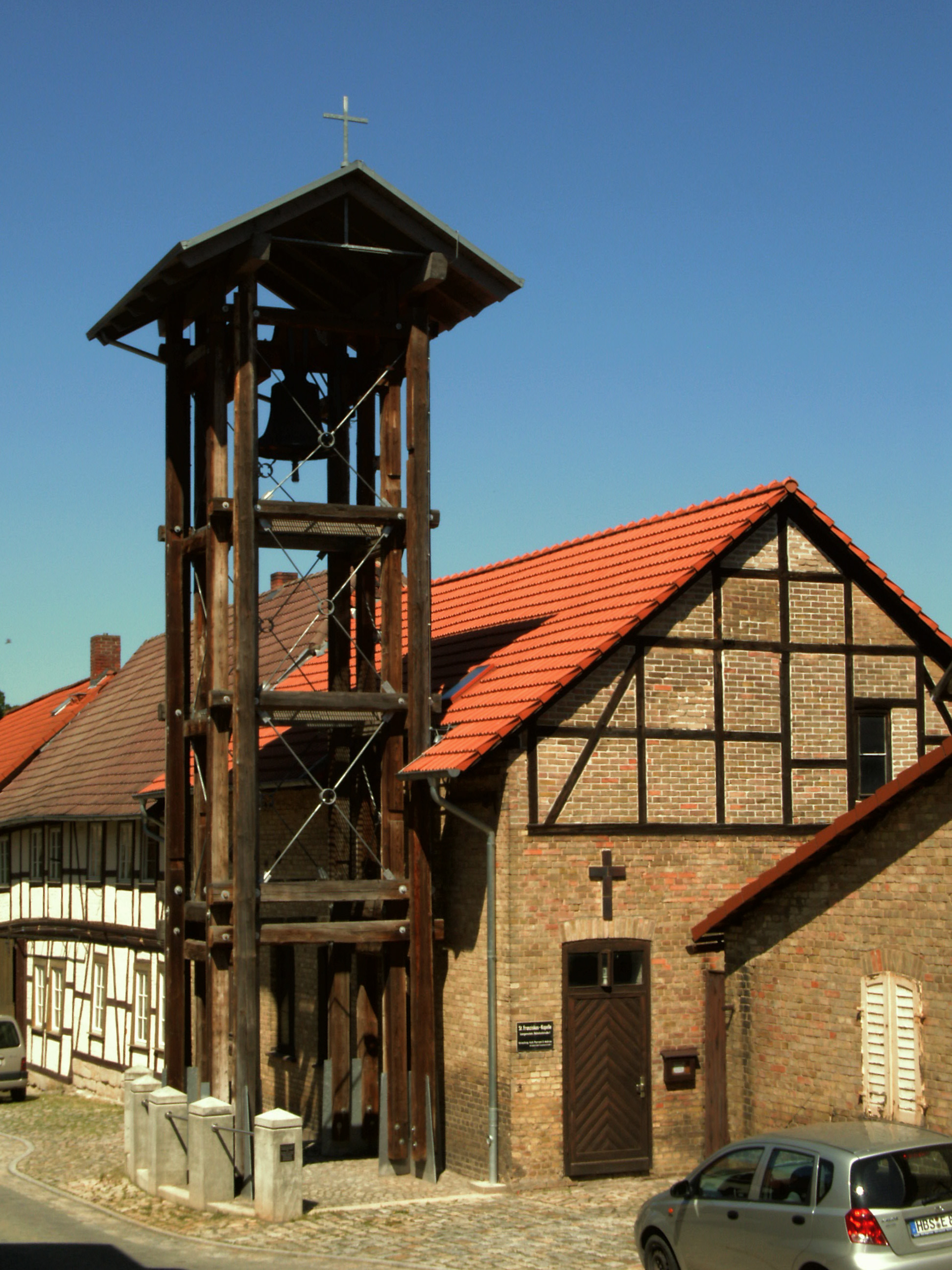 Katholische Kapelle St. Franziskus in Langenstein, Ortsteil von Halberstadt